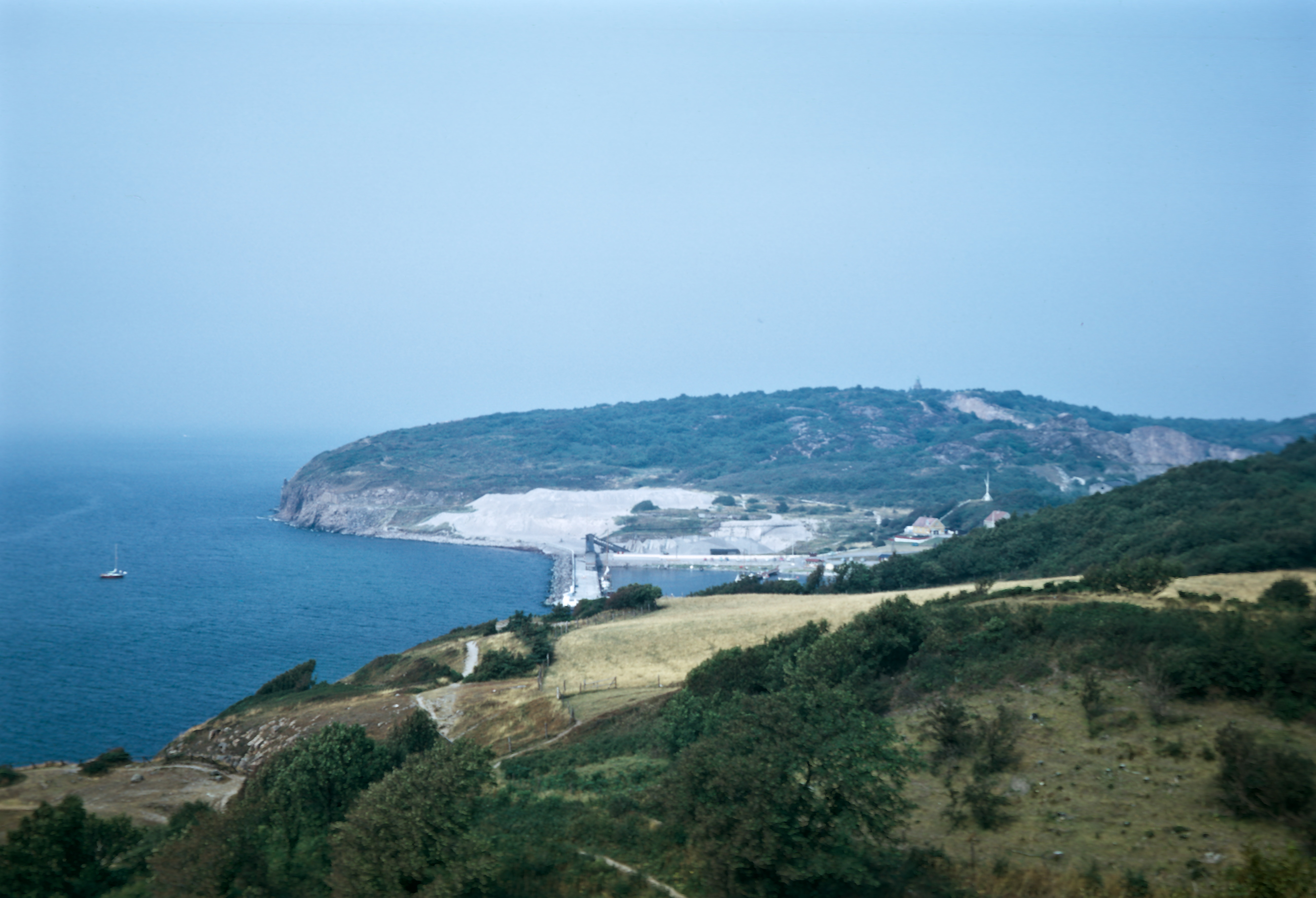 Hammerknuden med Hammerhavn, Bornholm, 1971